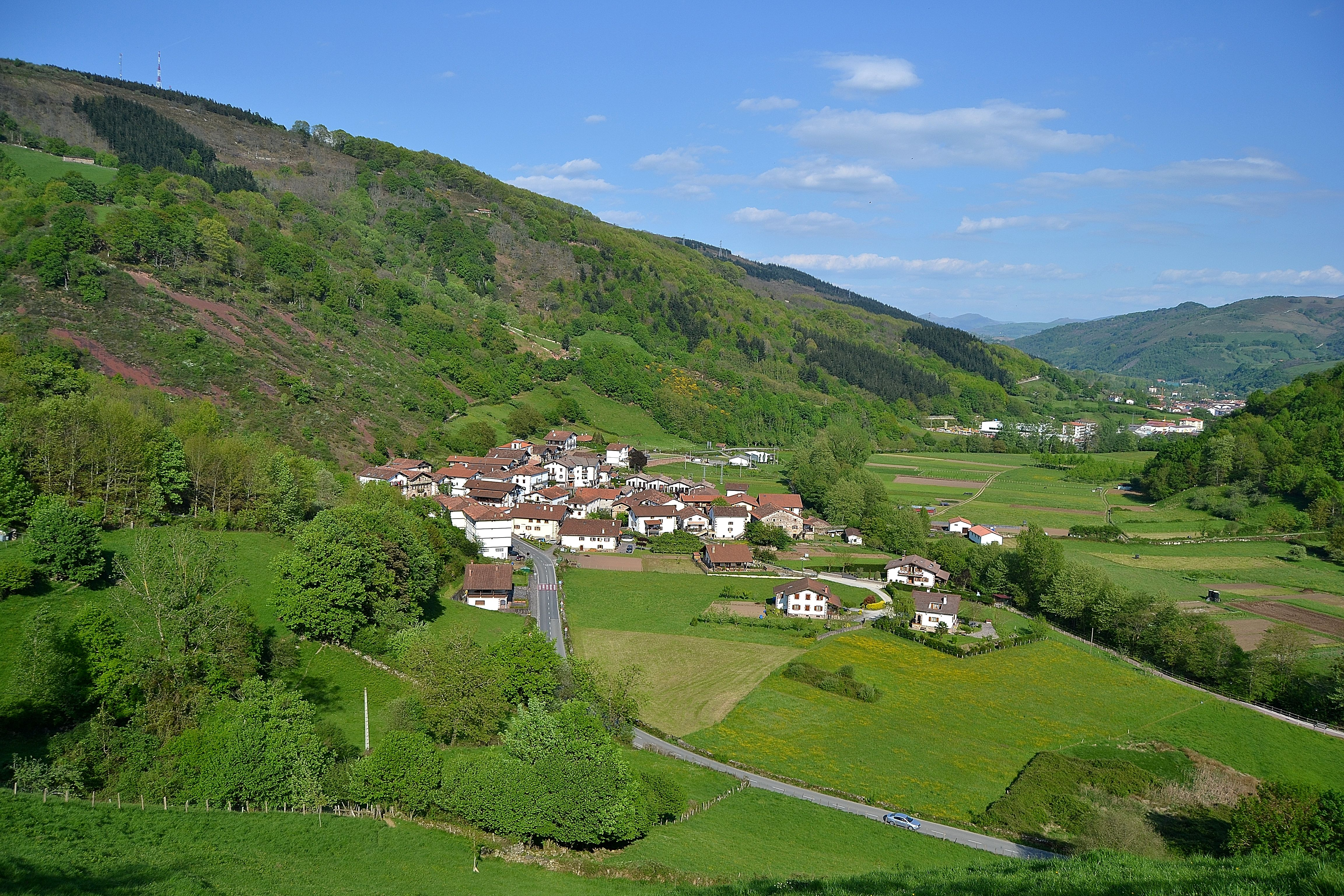 Elgorriaga. Malerreka, Nafarroa. Euskal Herria. Elgorriaga. Malerreka, Navarre. Basque Country.